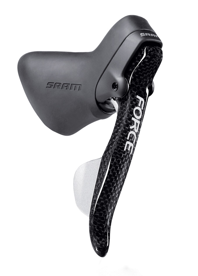 SRAM Force Brems-Schalthebel